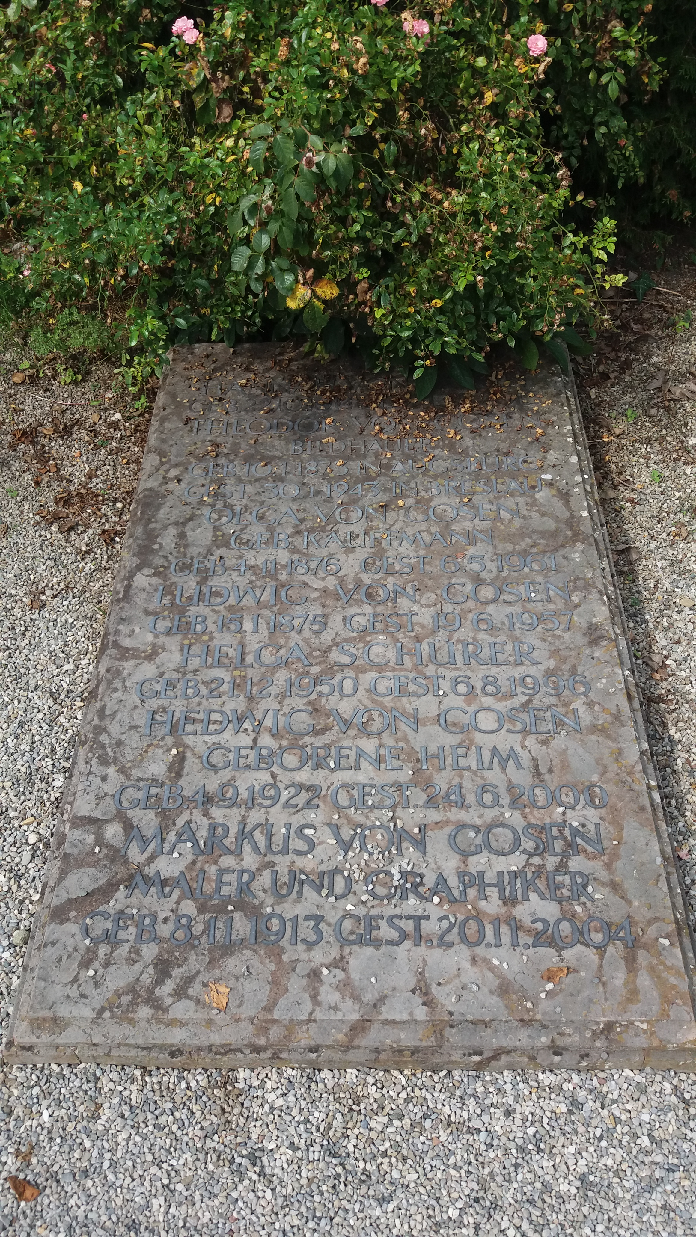 Grabstätte Familie von Gosen auf dem Inselfriedhof Frauenchiemsee